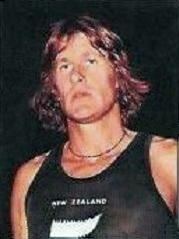 John Walker (1976), 'Montreal 76', Panini figurina n°110.